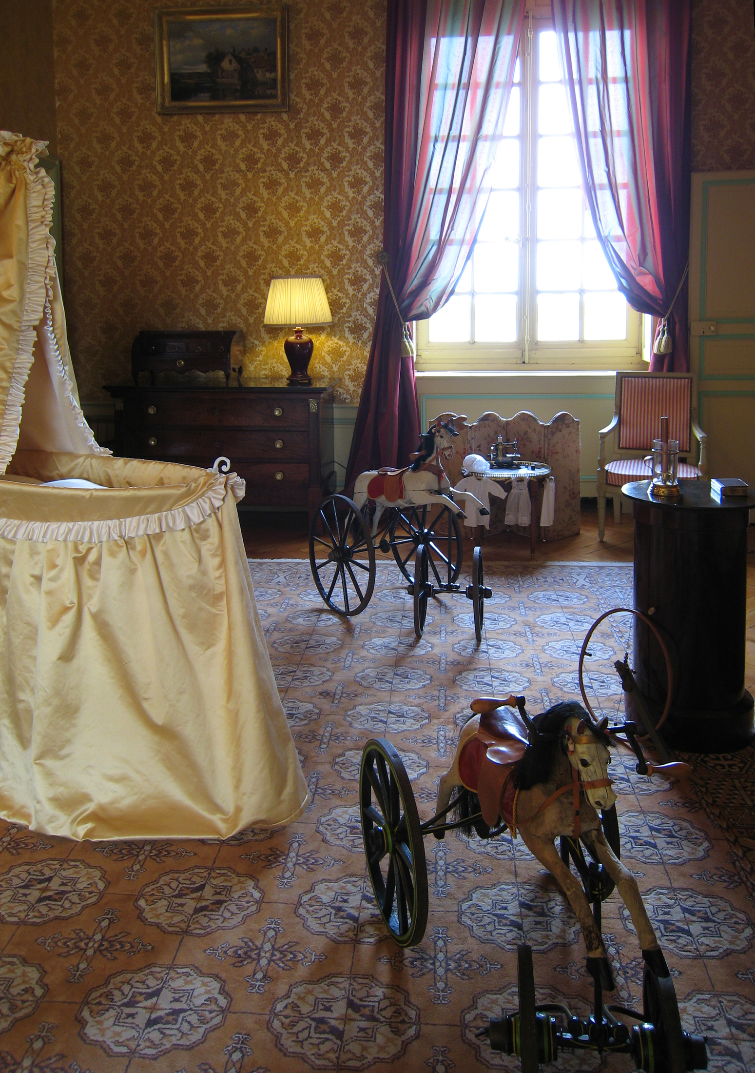 Château de Cheverny, Loir-et-Cher, France - children's room